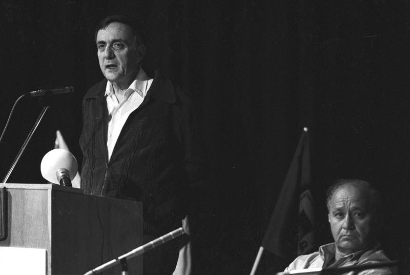 אורי לוברני נואם בכנס לזכר דוד אלעזר לצידו יצחק חופי?